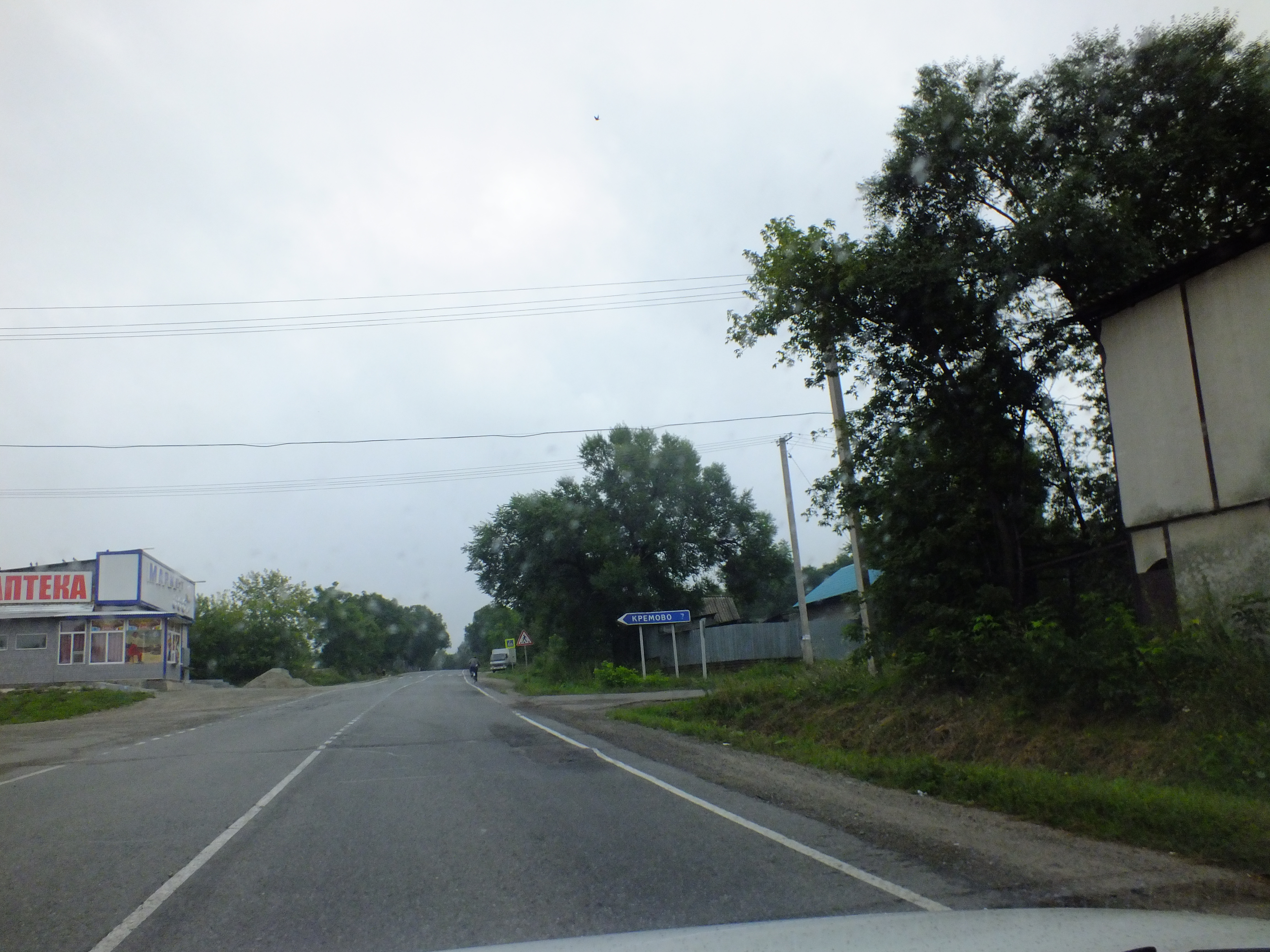 Село Осиновка Приморский край Михайловский район